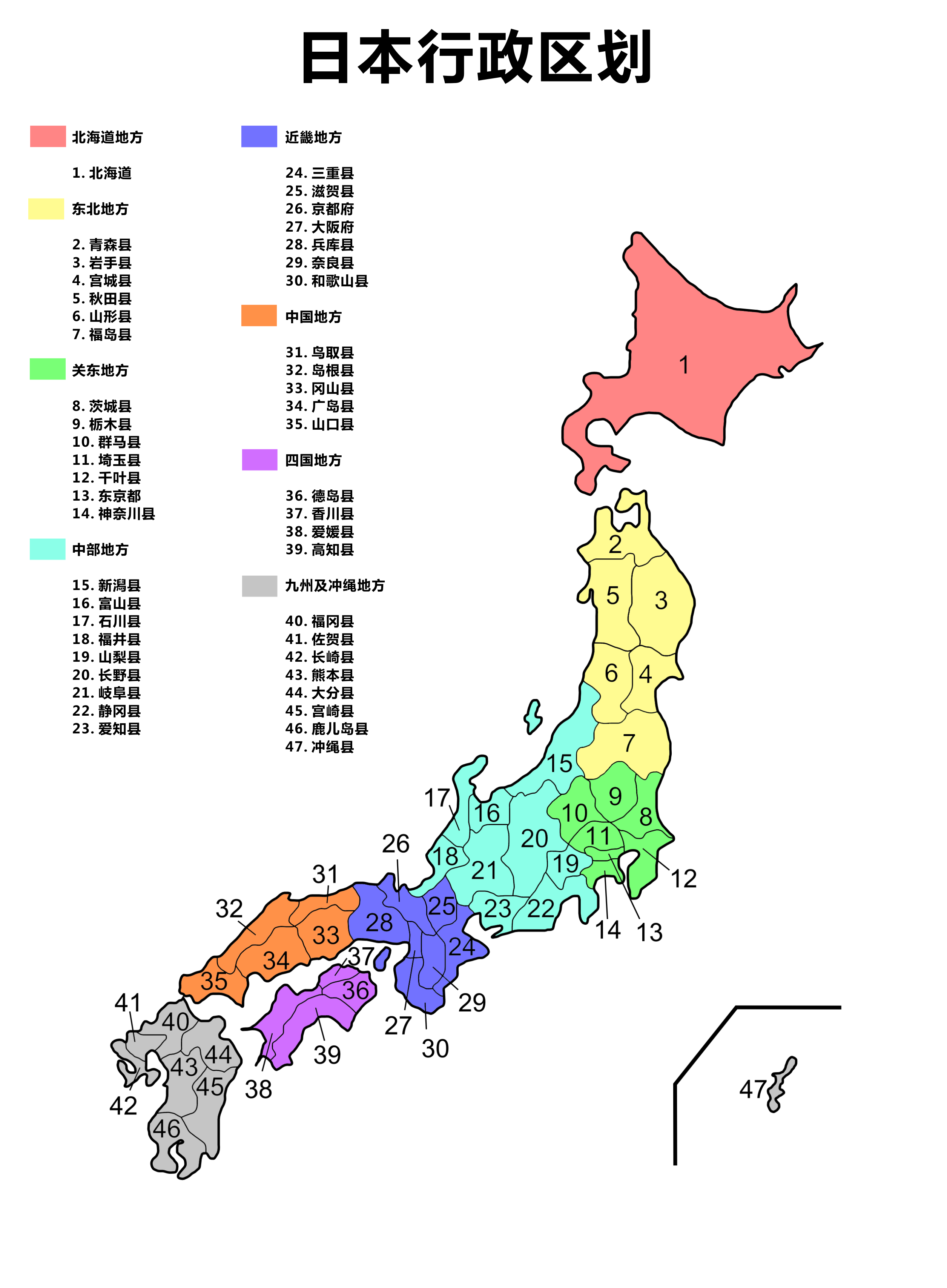 日本行政区划